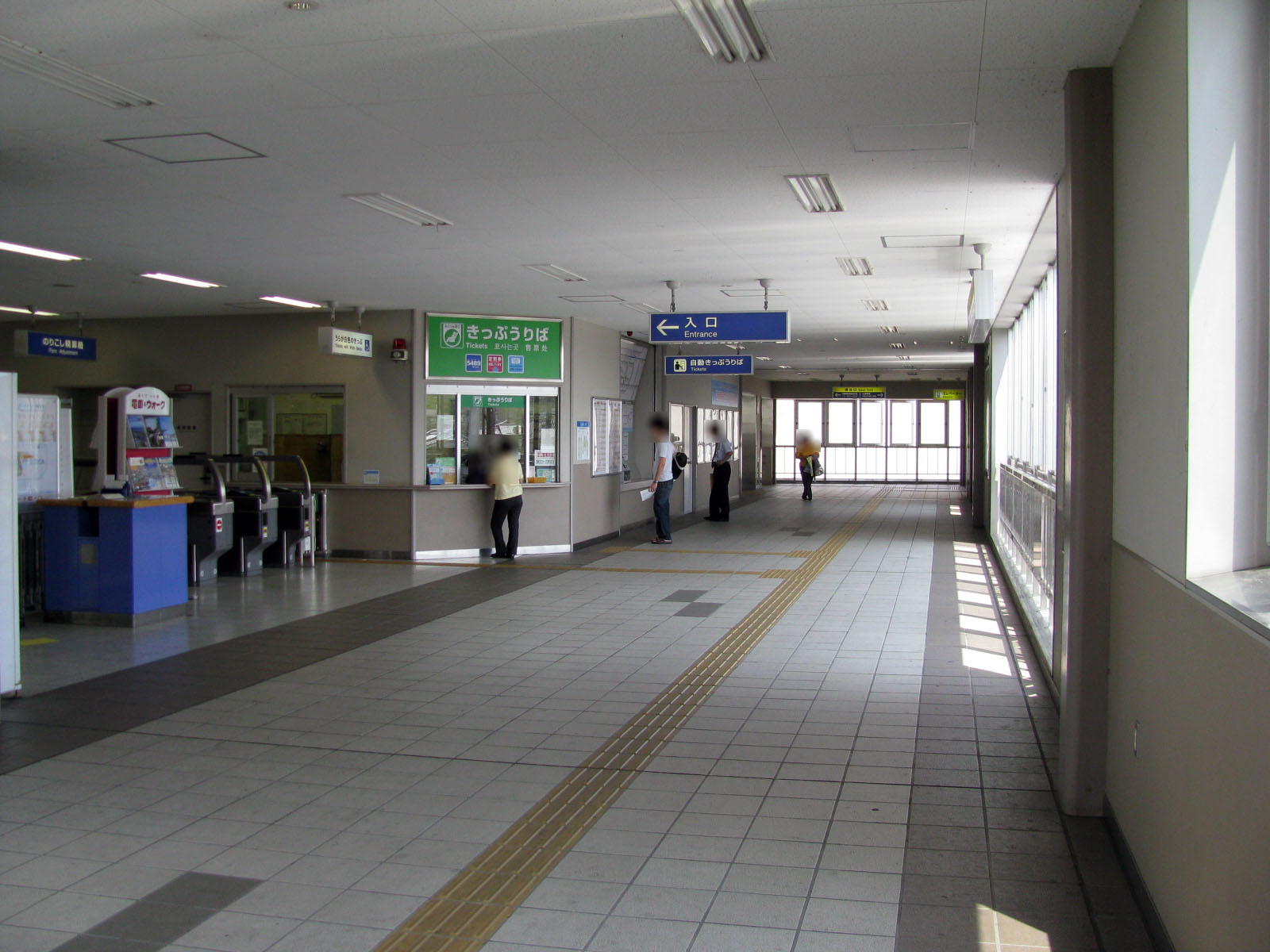 JR学研都市線京田辺駅